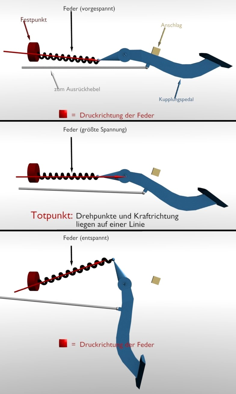 Funktion einer Totpunktfeder als Kupplungshilfe